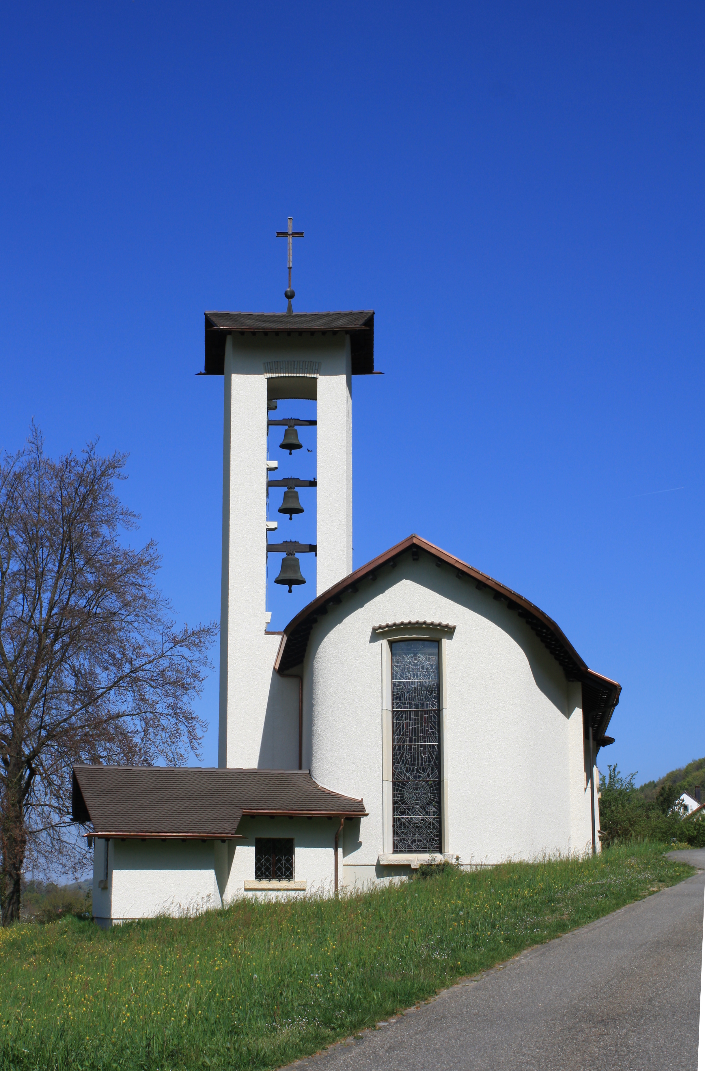 Kirche Hellikon